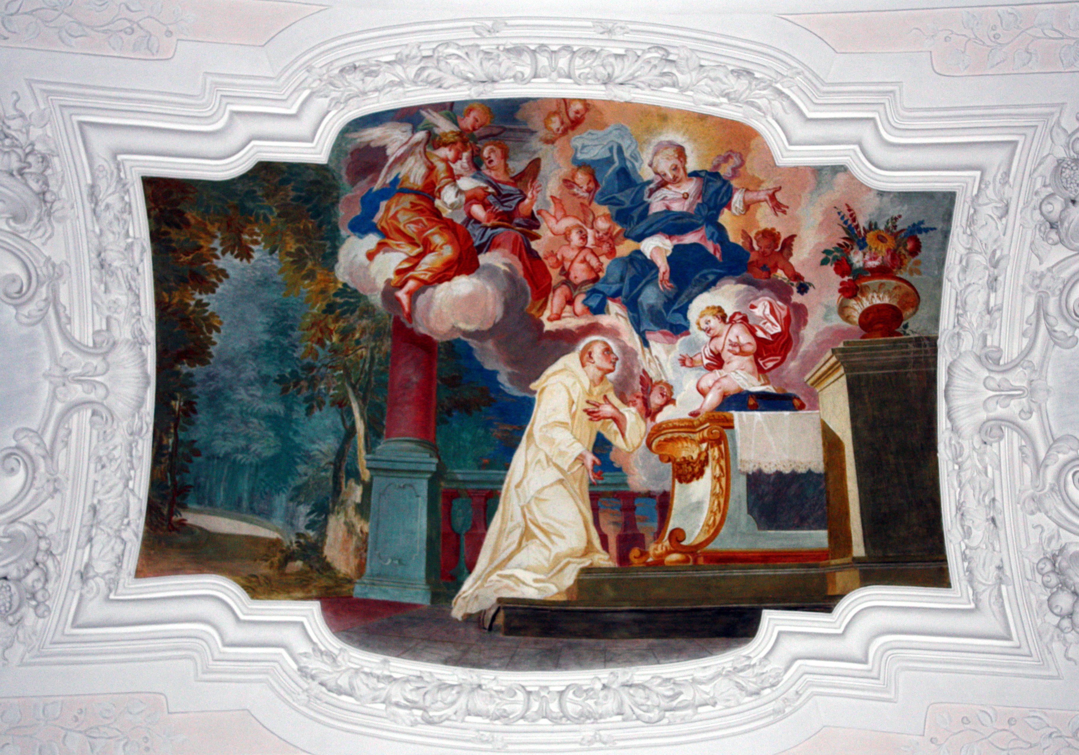 Fresko in der ehemaligen Klosterkirche der Kartause in Buxheim bei Memmingen - OpenStreetMap (Info)